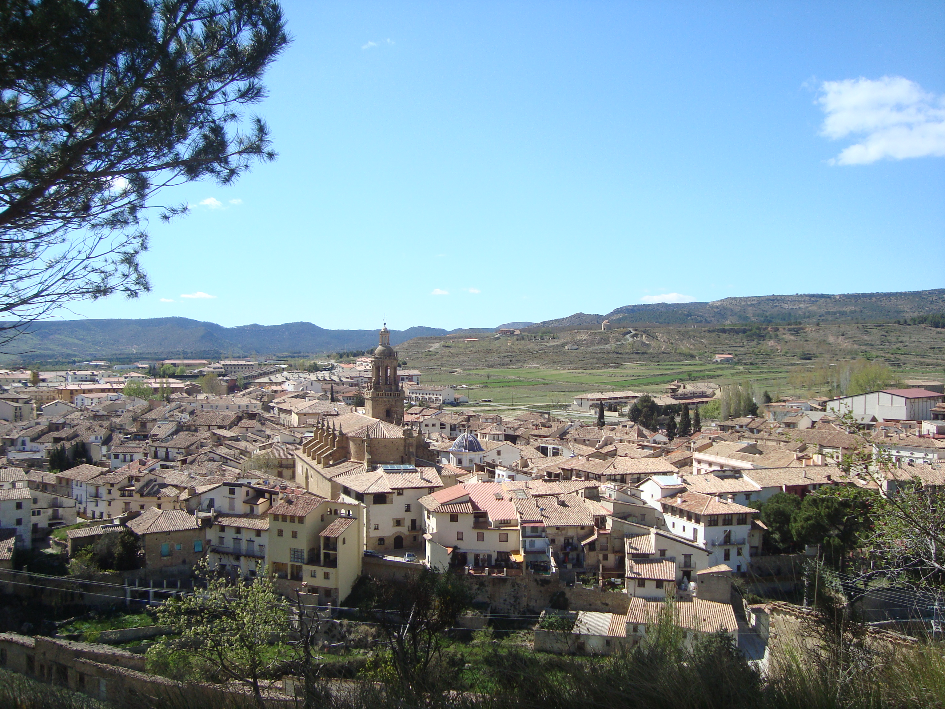 Panorámica de Rubielos de Mora (Teruel, Aragón)